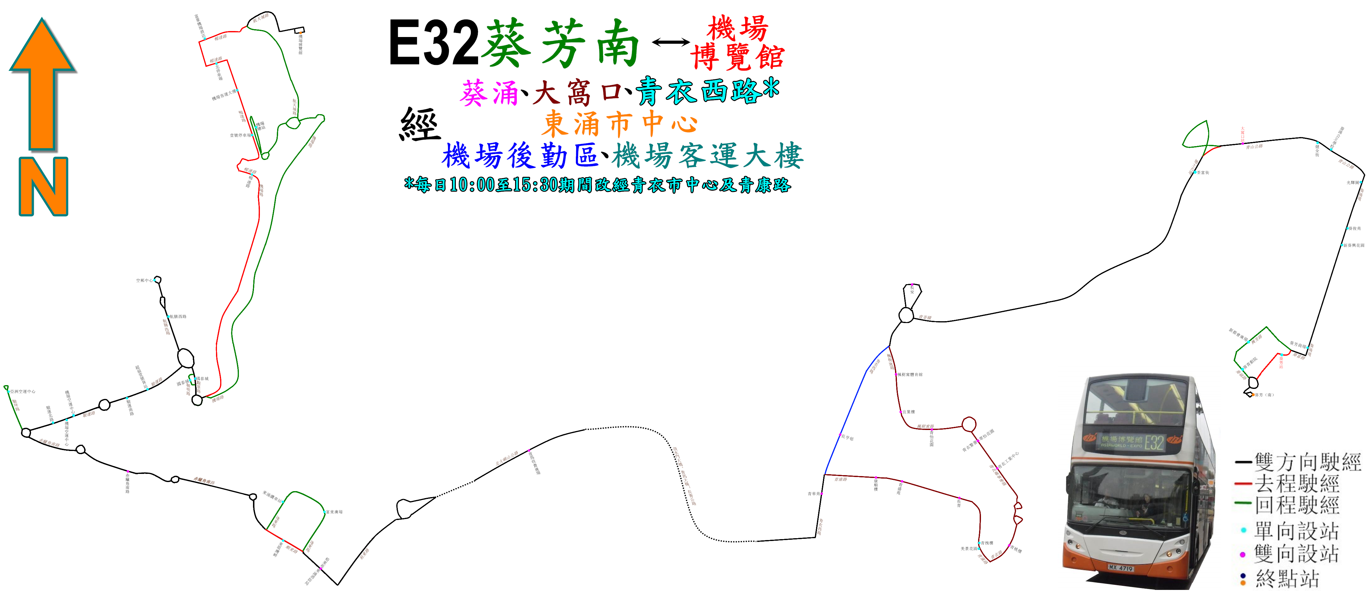 中文（香港）: 龍運巴士E32線的走線圖